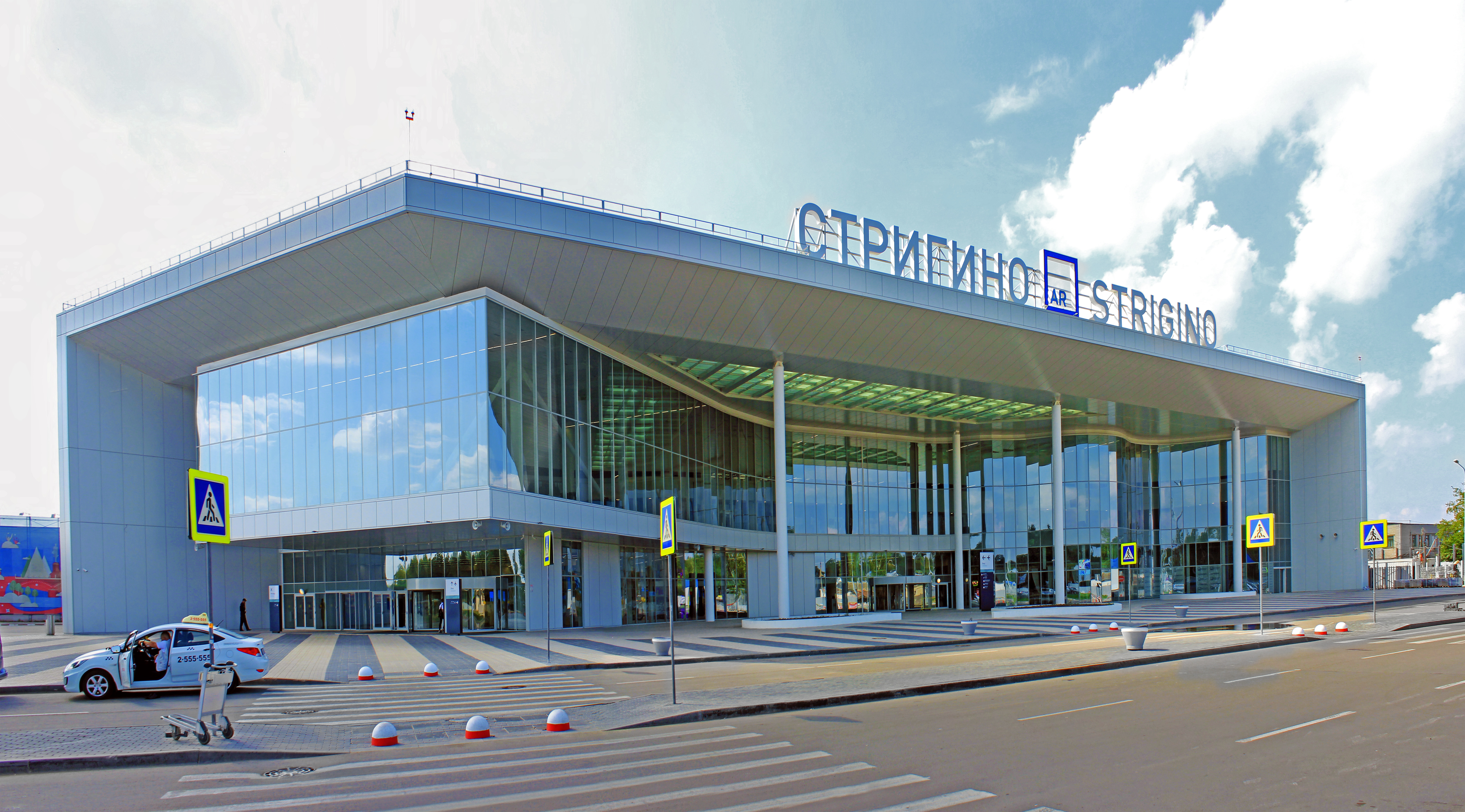 Новый терминал нижегородского аэропорта "Стригино".